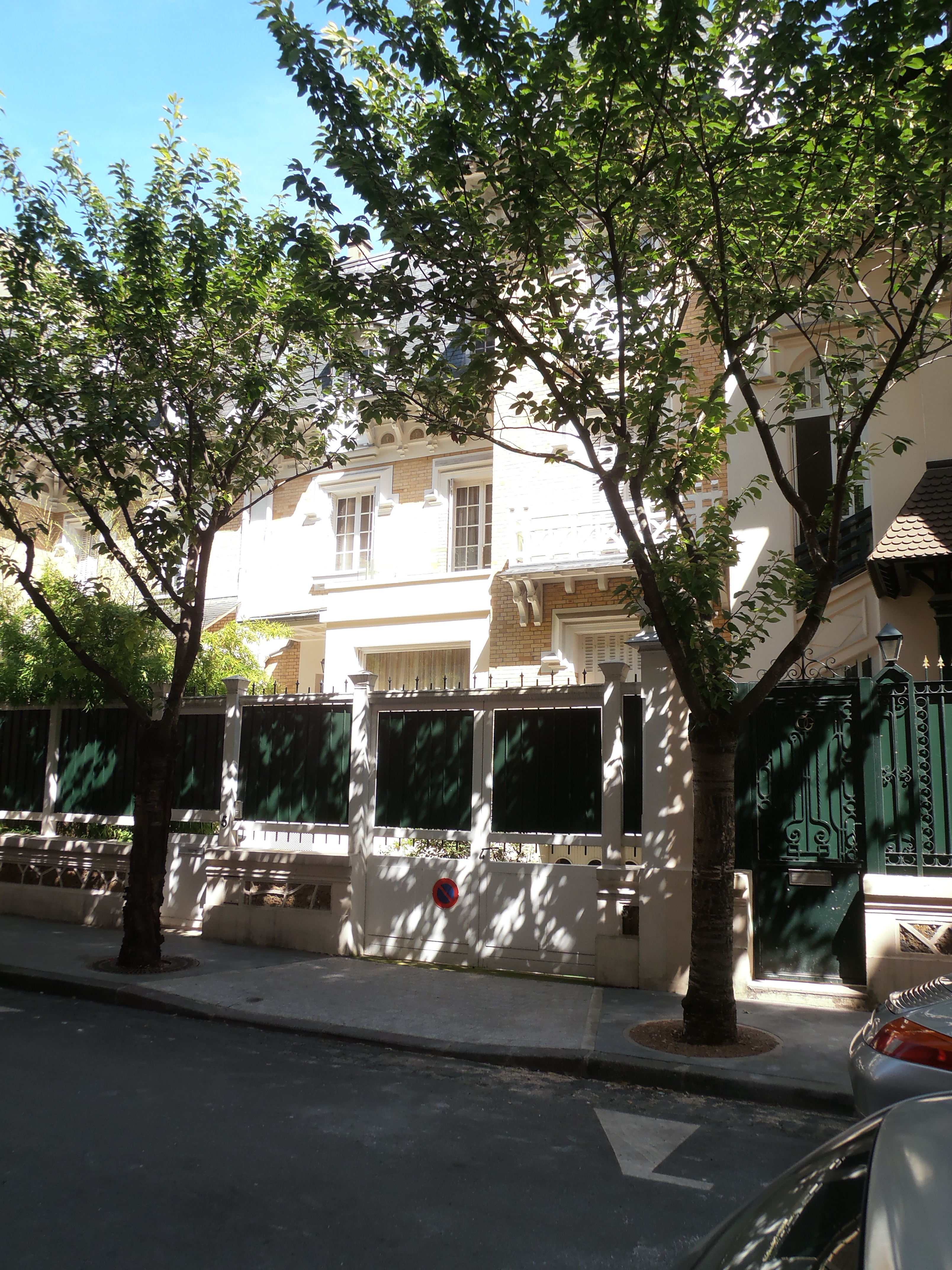 5, Rue Louis Besquel, Vincennes, lieu de regroupement par la police française des habitants juifs de Vincennes raflés le 17 juillet 1942 (Rafle du Vélodrome d'hiver). Photographie prise exactement 70 ans après la rafle.